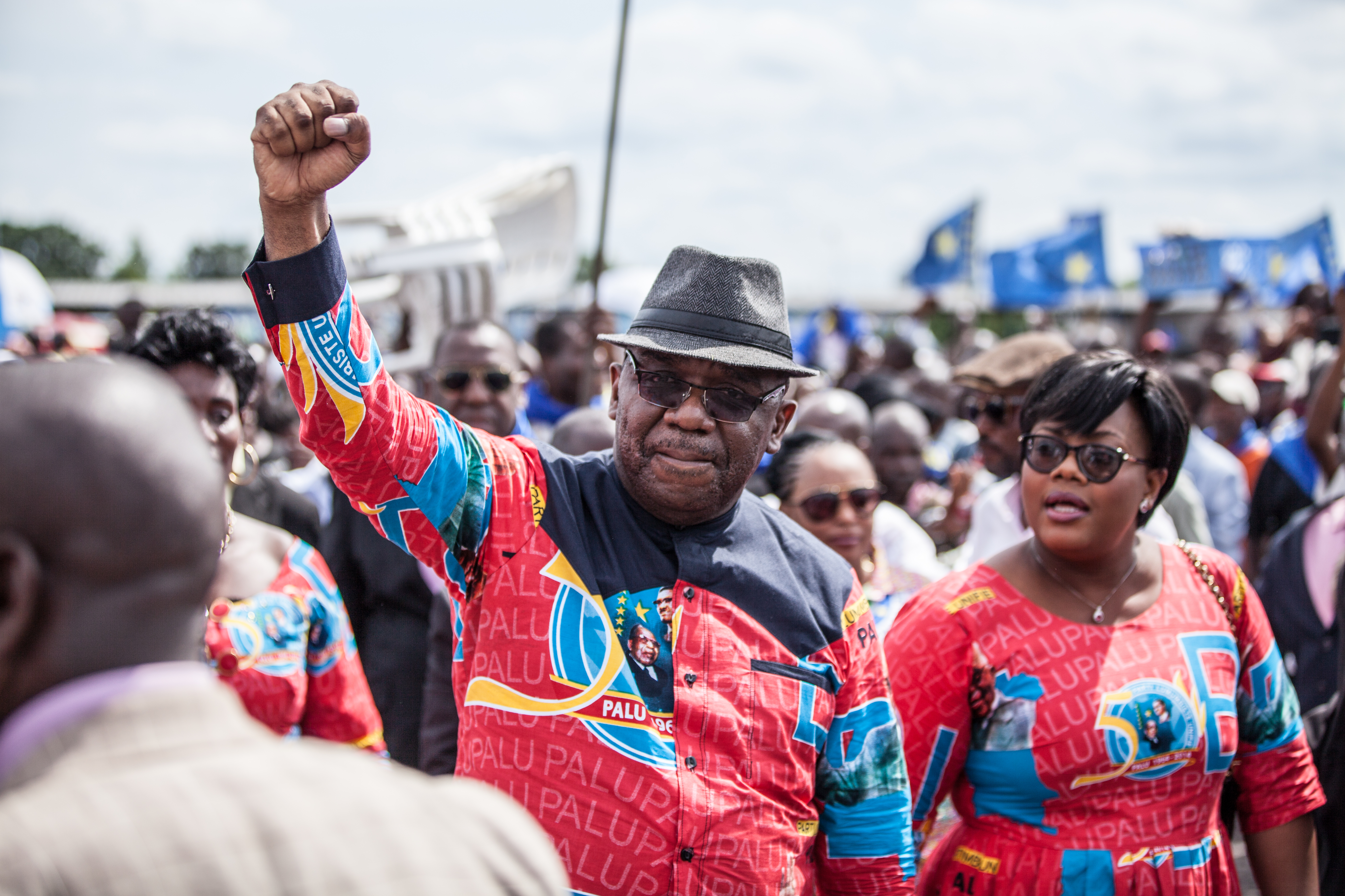 FIKIN - PALU17 JANVIER